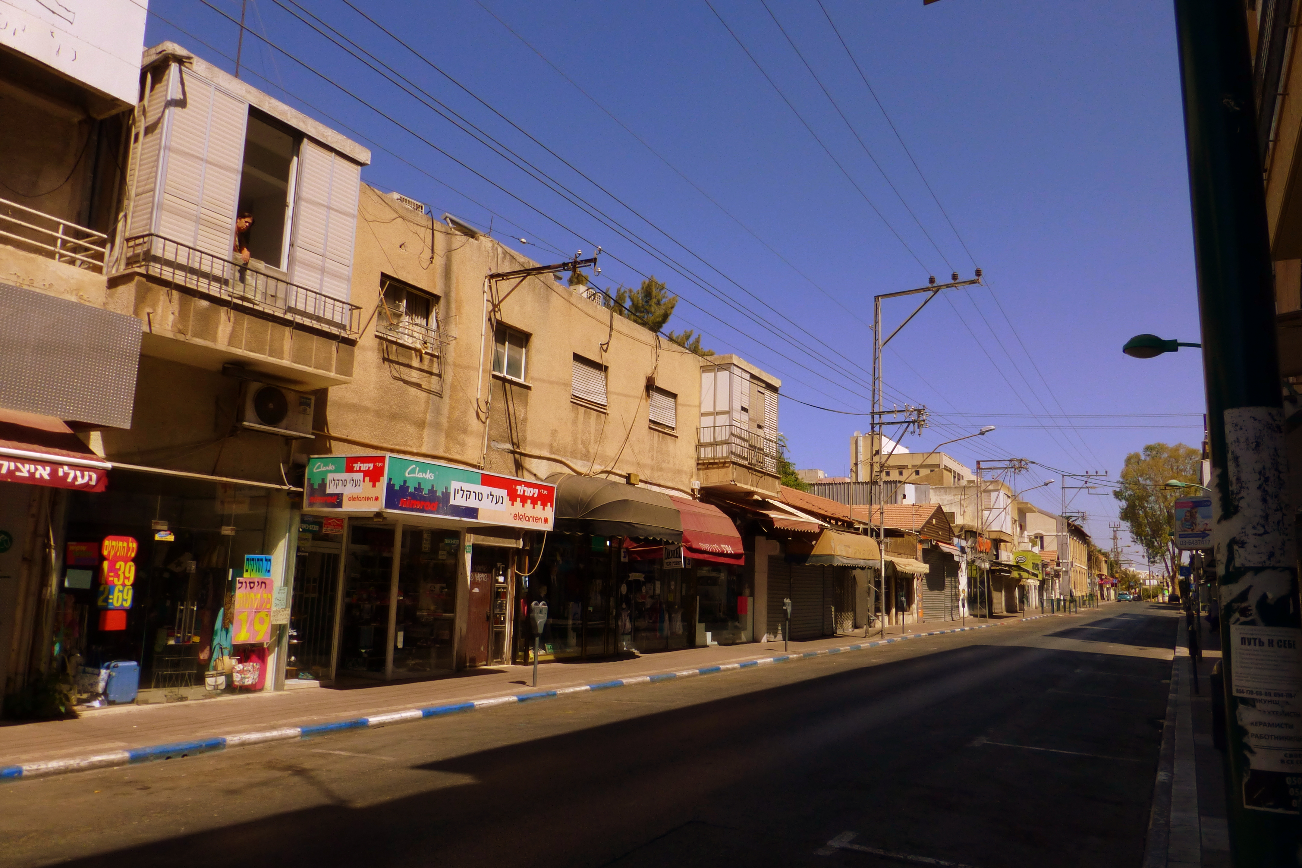 ביתו של צבי גרף, שהקים בשנת 1901 את שירות הדיליז'נסים בפתח תקווה.